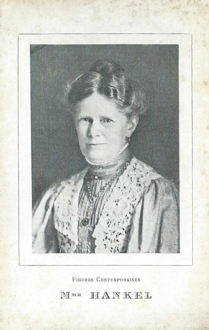 Marie Hankel, 1908